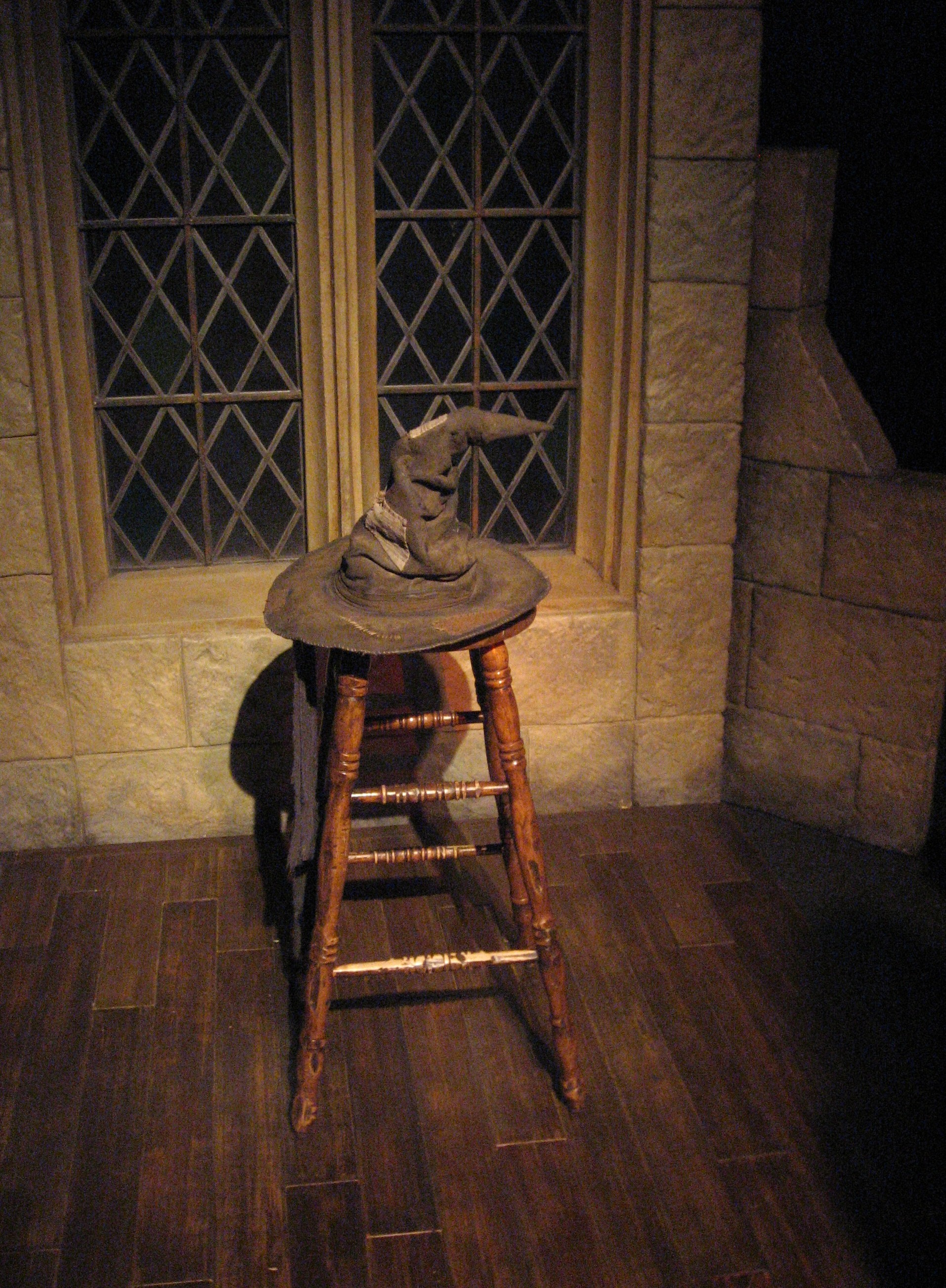 Le choixpeau magique (Sorting Hat) exposé à La Cité du Cinéma (Saint-Denis, Paris). "Harry Potter, l'exposition".